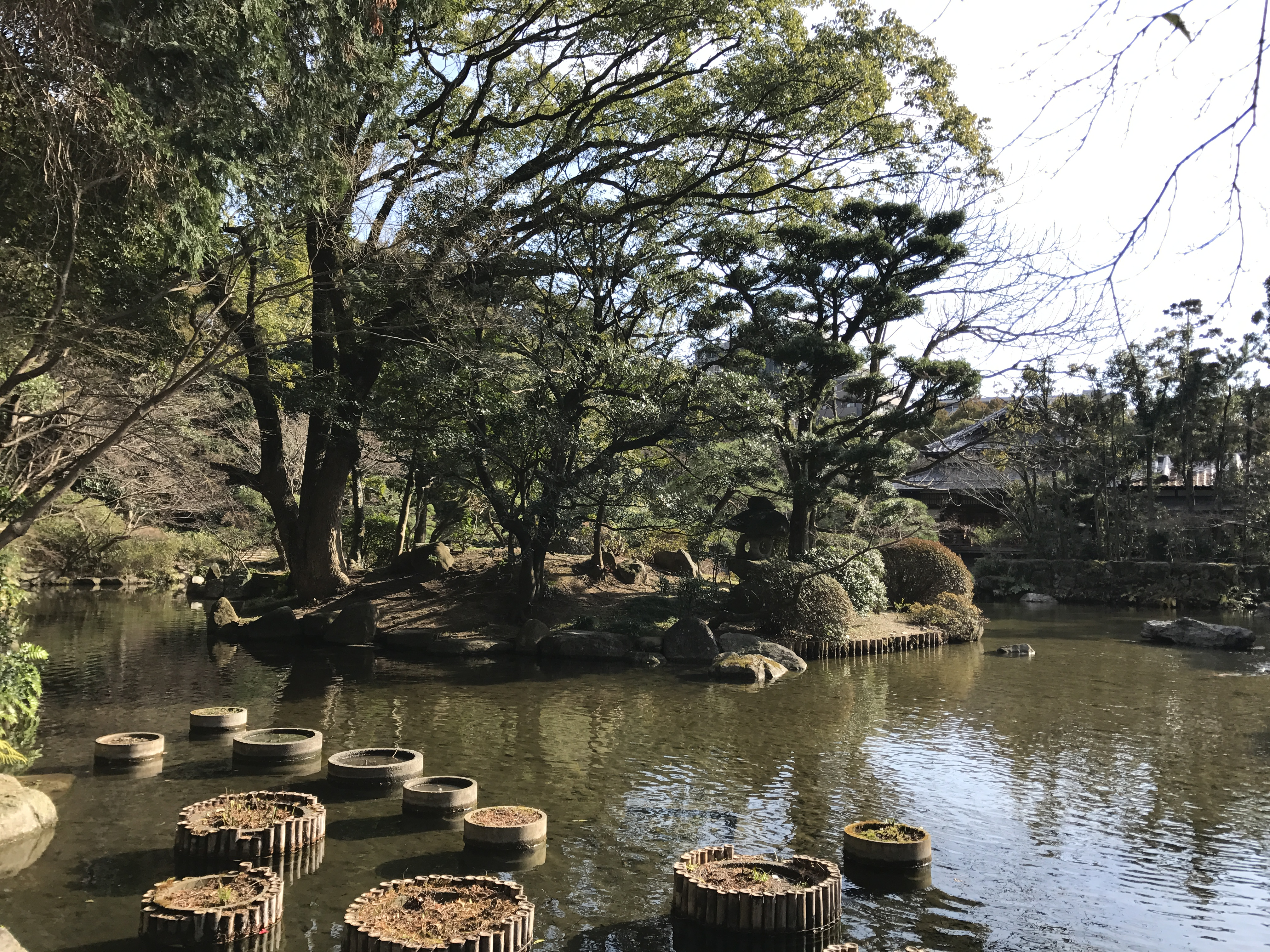 友泉亭公園の池と蓬莱島